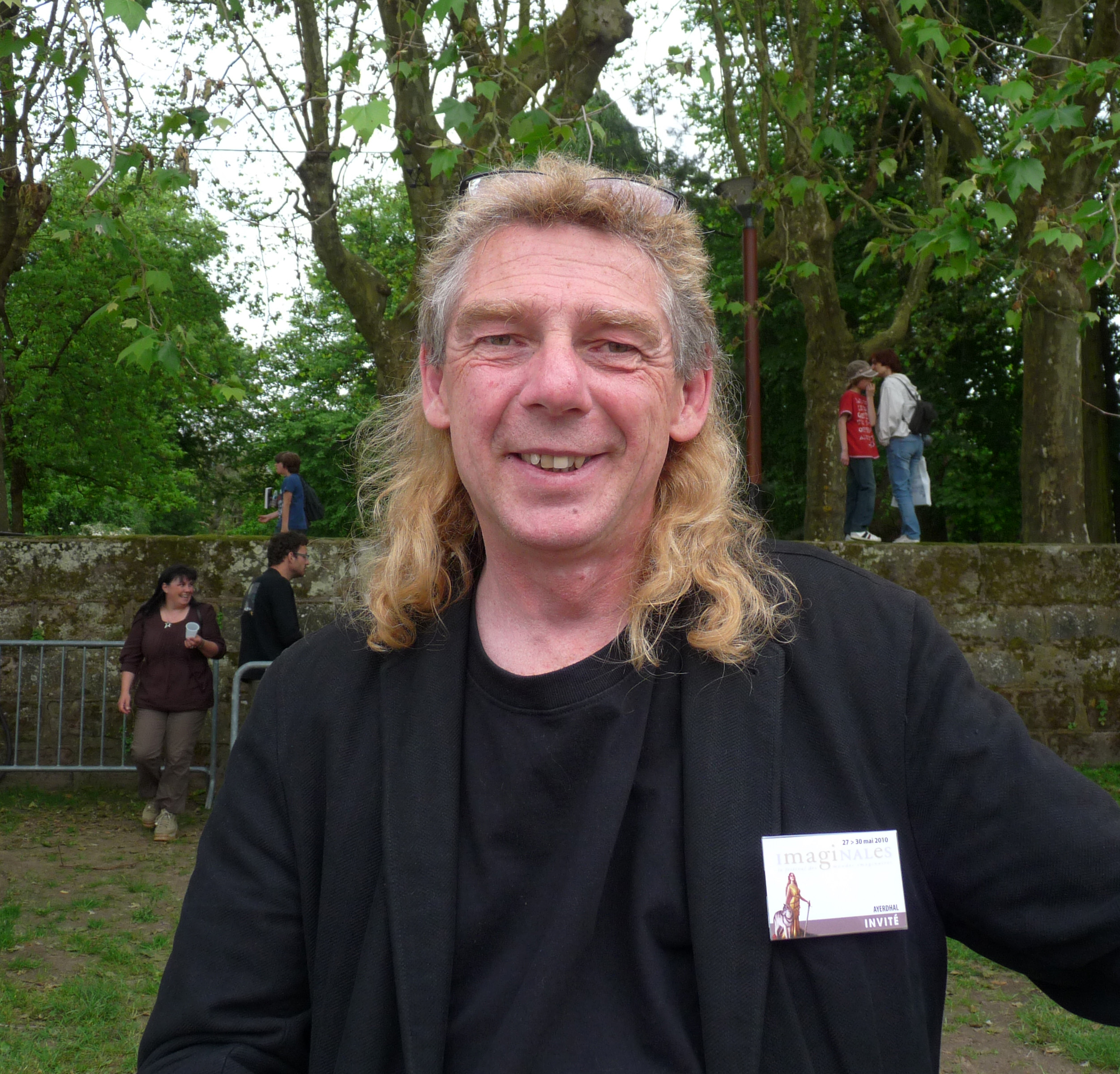 Ayerdhal (Imaginales 2010, Epinal)